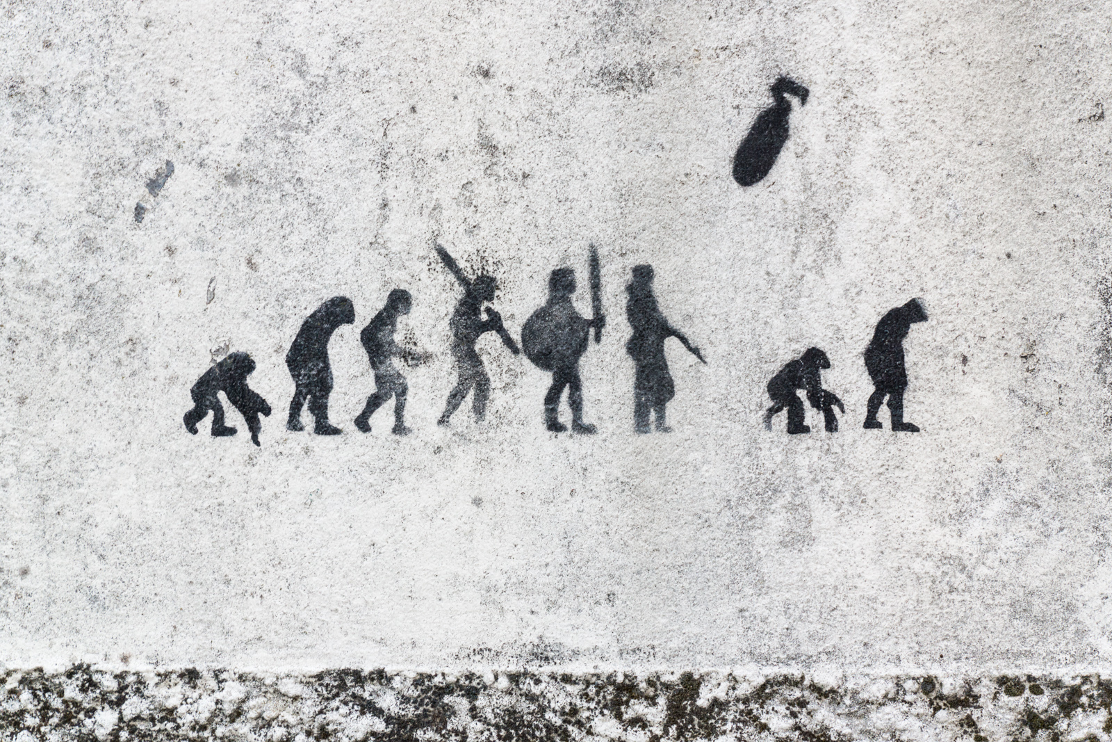 PORTO - 201409 - 127 Tags: grafitti urbanart porto oporto arteurbano graffitikarmoporto